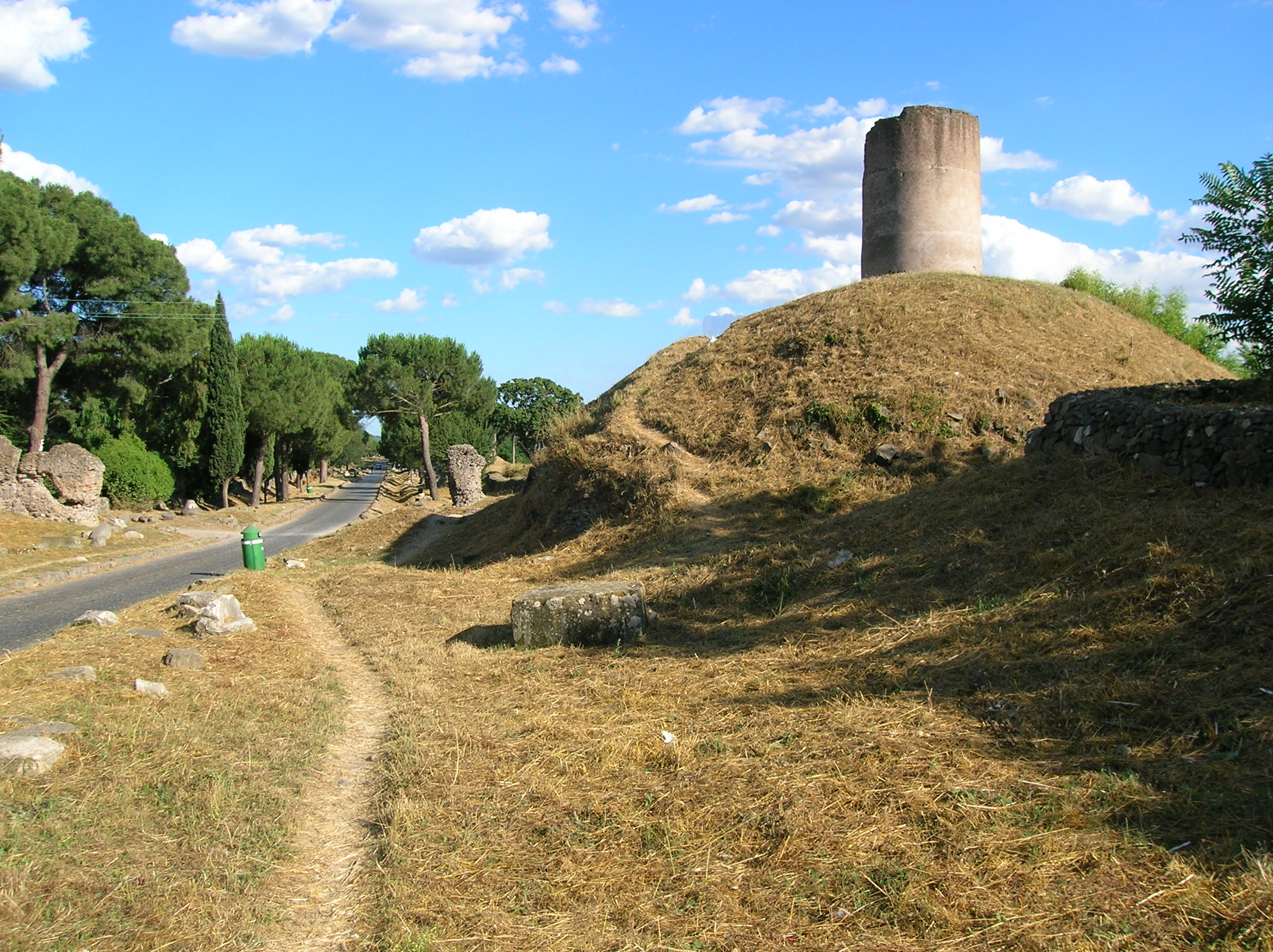 Appia antica (cd. Tumulo dei Curazi). Si veda qui lo stesso sito un attorno al 1900